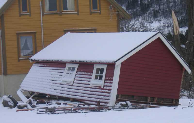 Stabbur blese over ende i ekstremveret Dagmar